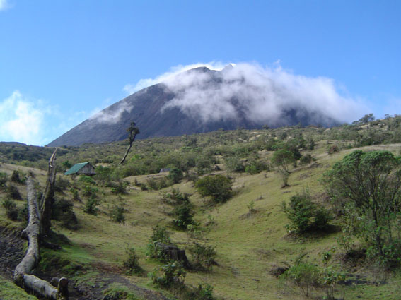 מבט על הר הפקאיה בגואטמלה